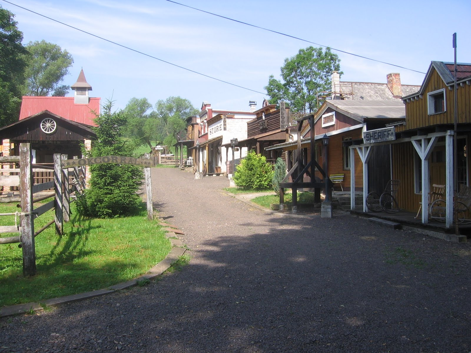 Westernové městečko v Jívce